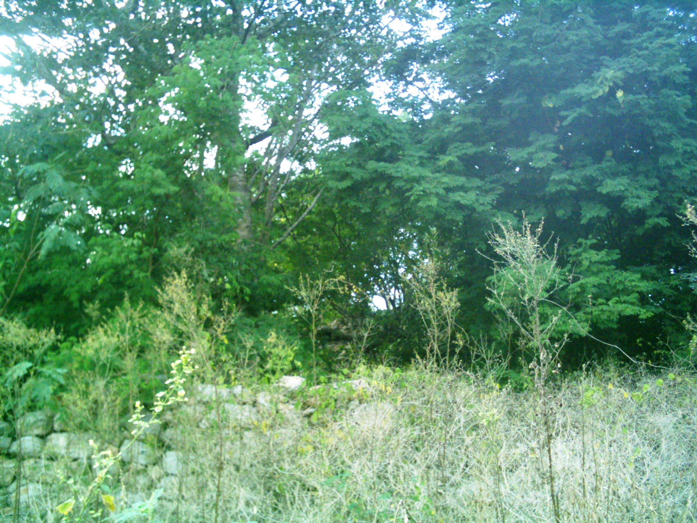 Vestigios mayas de la Colonia Francisco Viila Oriente, Kanasín, Yucatán.